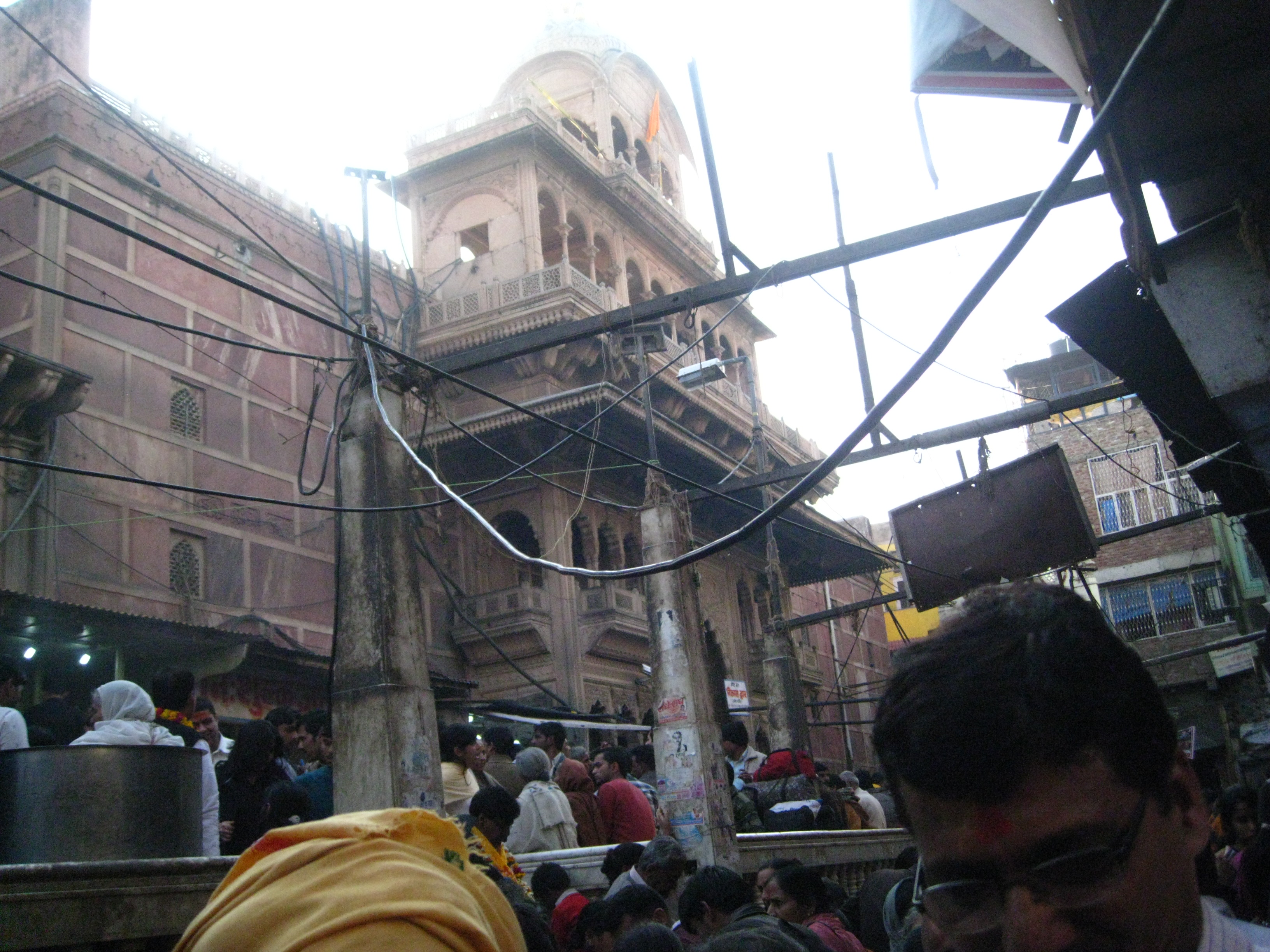 Bankebihari temple gate, sideview Vrindavana